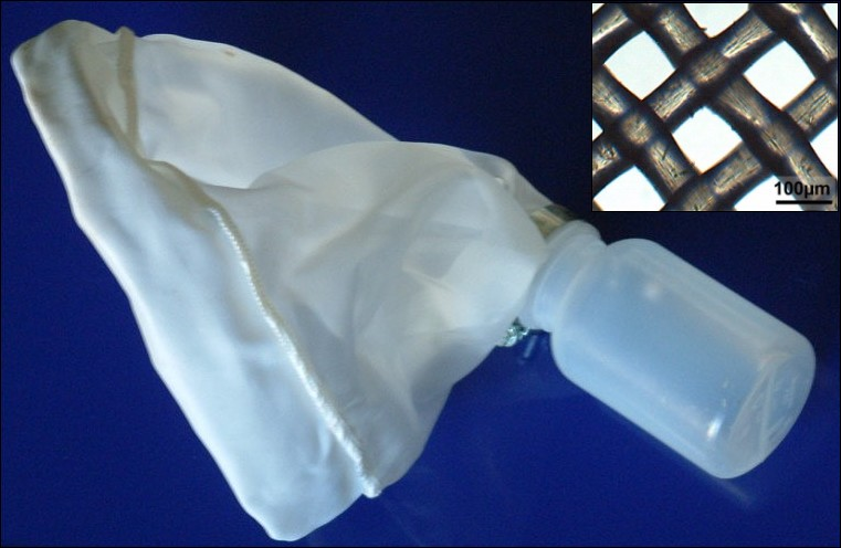 plankton net, mesh size 100µm.